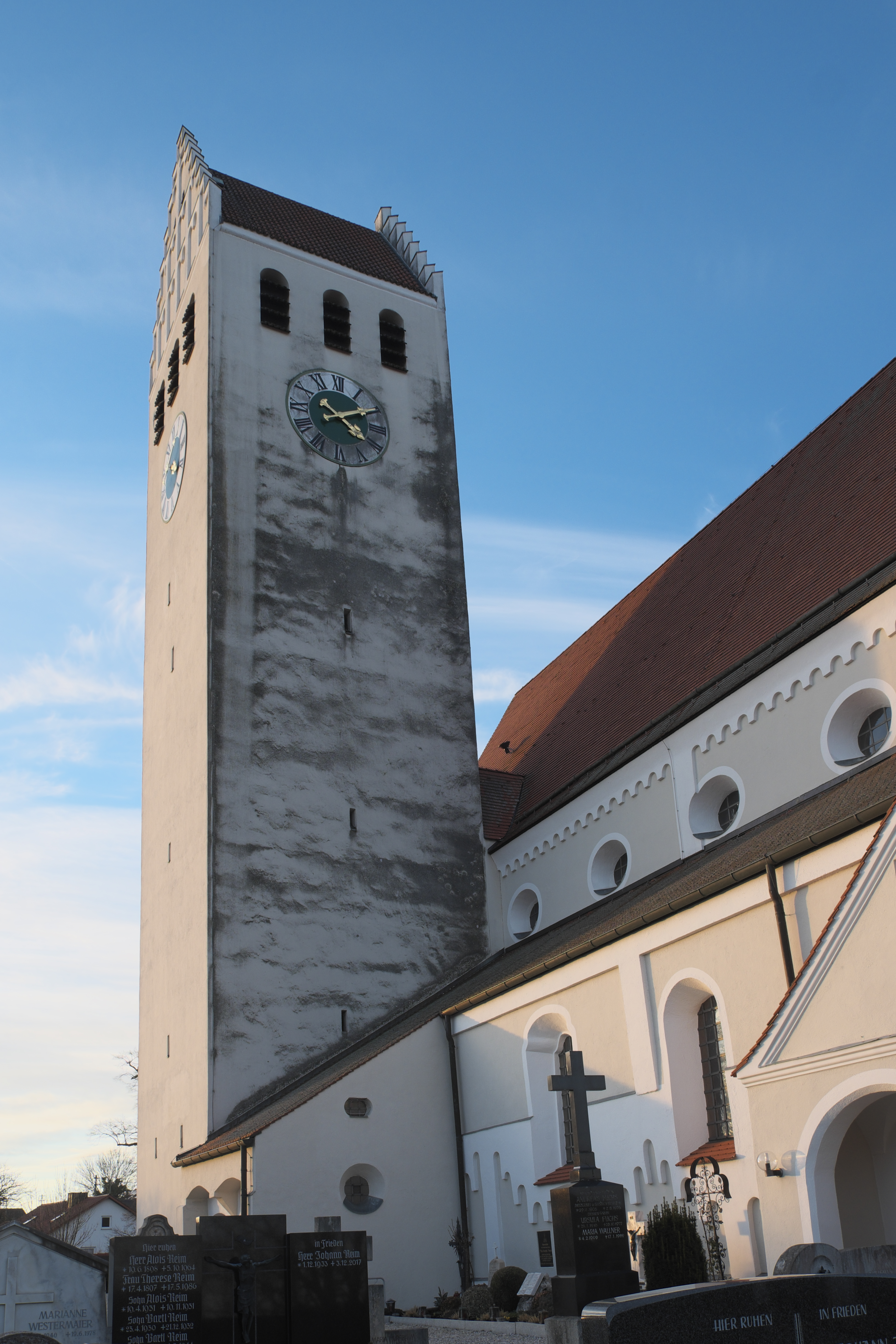 Katholische Pfarr-, ehemalige Kollegiatstiftskirche St. Arsatius in Ilmmünster im Landkreis Pfaffenhofen an der Ilm (Bayern/Deutschland), Turm und Sudseite